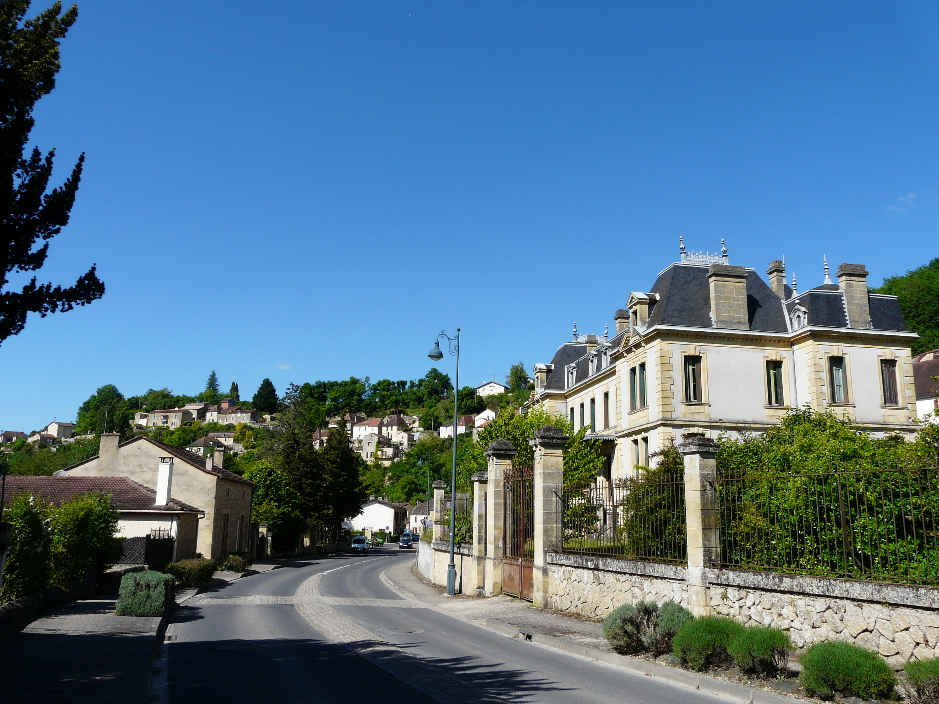 Le village de Couze-et-Saint-Front, Dordogne, France.